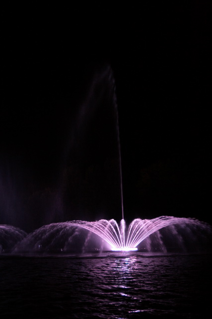 Фото Юрій Басюк